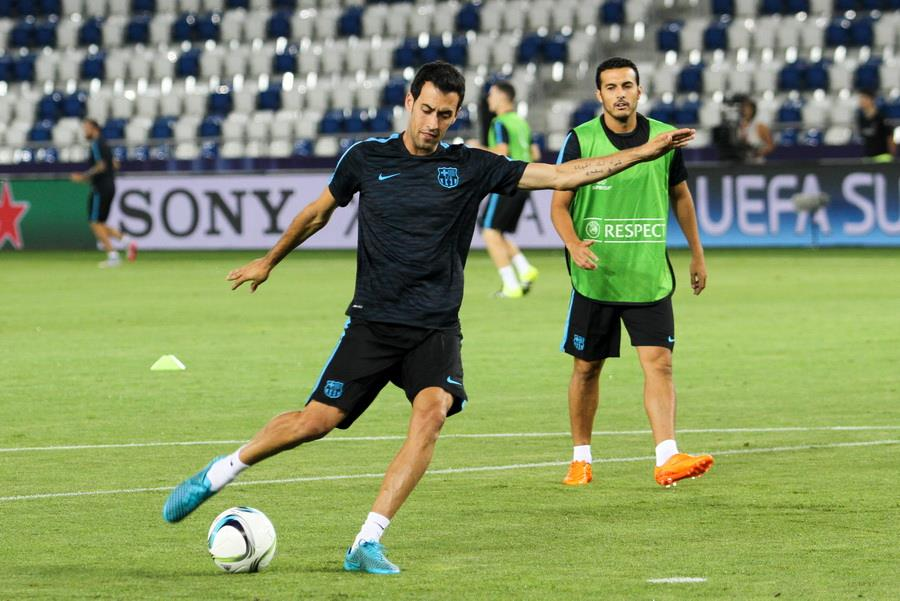 Напередодні матчу за Суперкубок УЄФА у Тбілісі, Грузія.